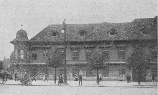 Aehrenthalský palác v Praze